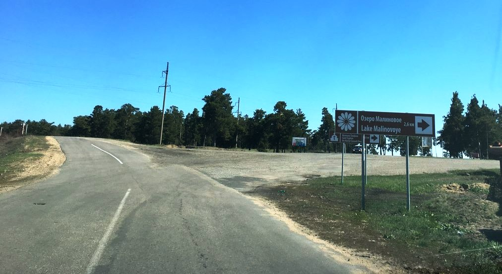 Перекресток на въезде в п.Малиновое Озеро